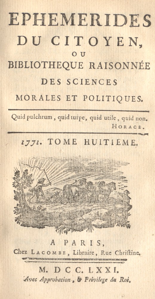 Journal physiocratique rédigé par du Pont de Nemours dès 1768